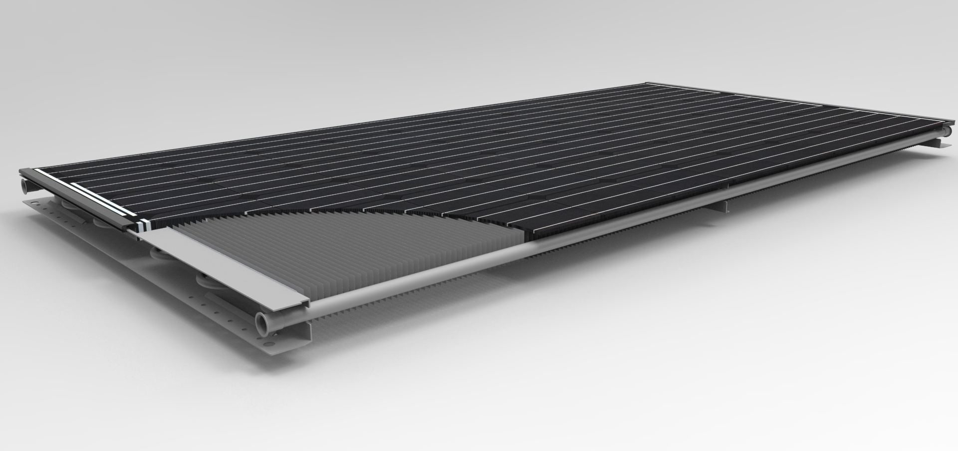 Warmtepomppaneel This work is free and may be used by anyone for any purpose. If you wish to use this content, you do not need to request permission as long as you follow any licensing requirements mentioned on this page.